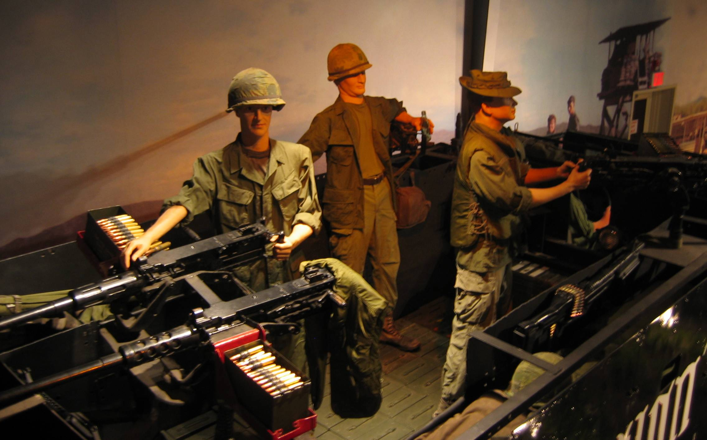 В кузове ган-трака "Eve of Destruction".